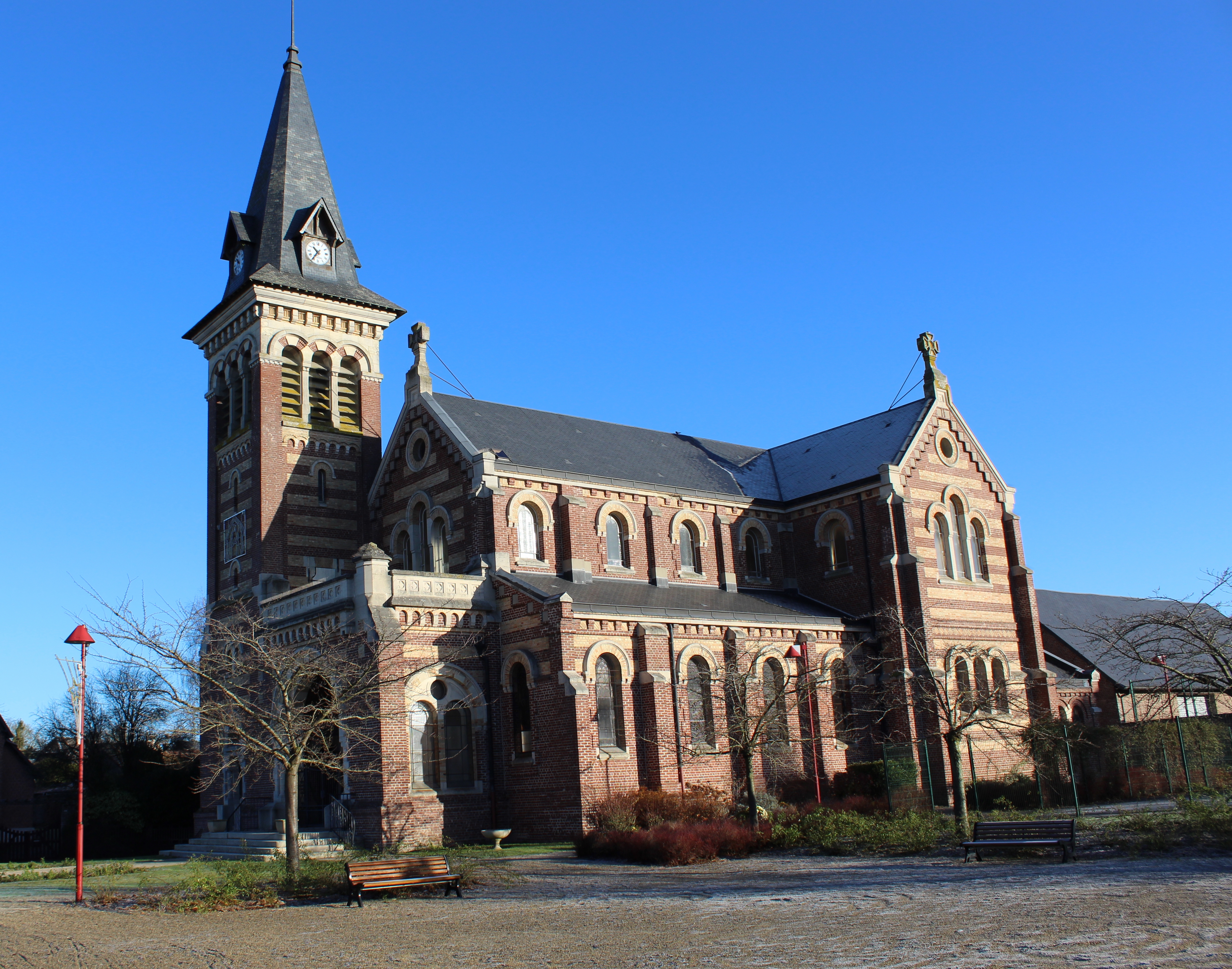 L'église.